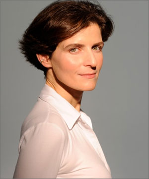 La scrittrice Margherita d'Amico fotografata da Chieregato